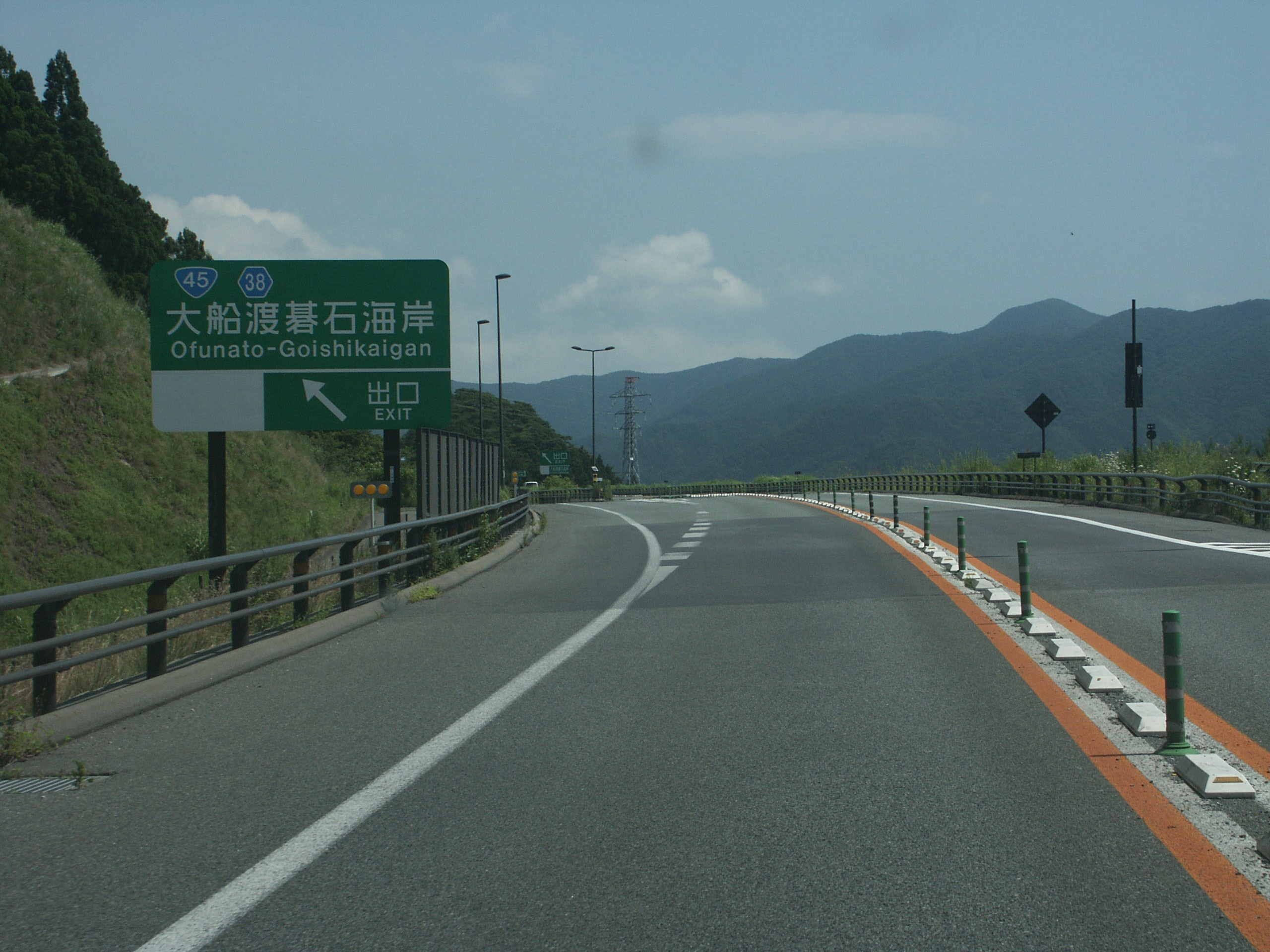 三陸自動車道（高田道路）大船渡碁石海岸IC出口（陸前高田IC方面側）